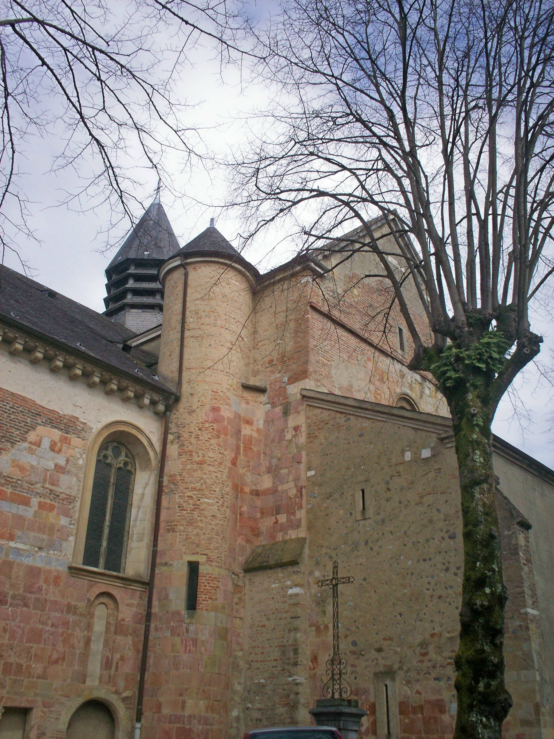 Catedrala de Lescar